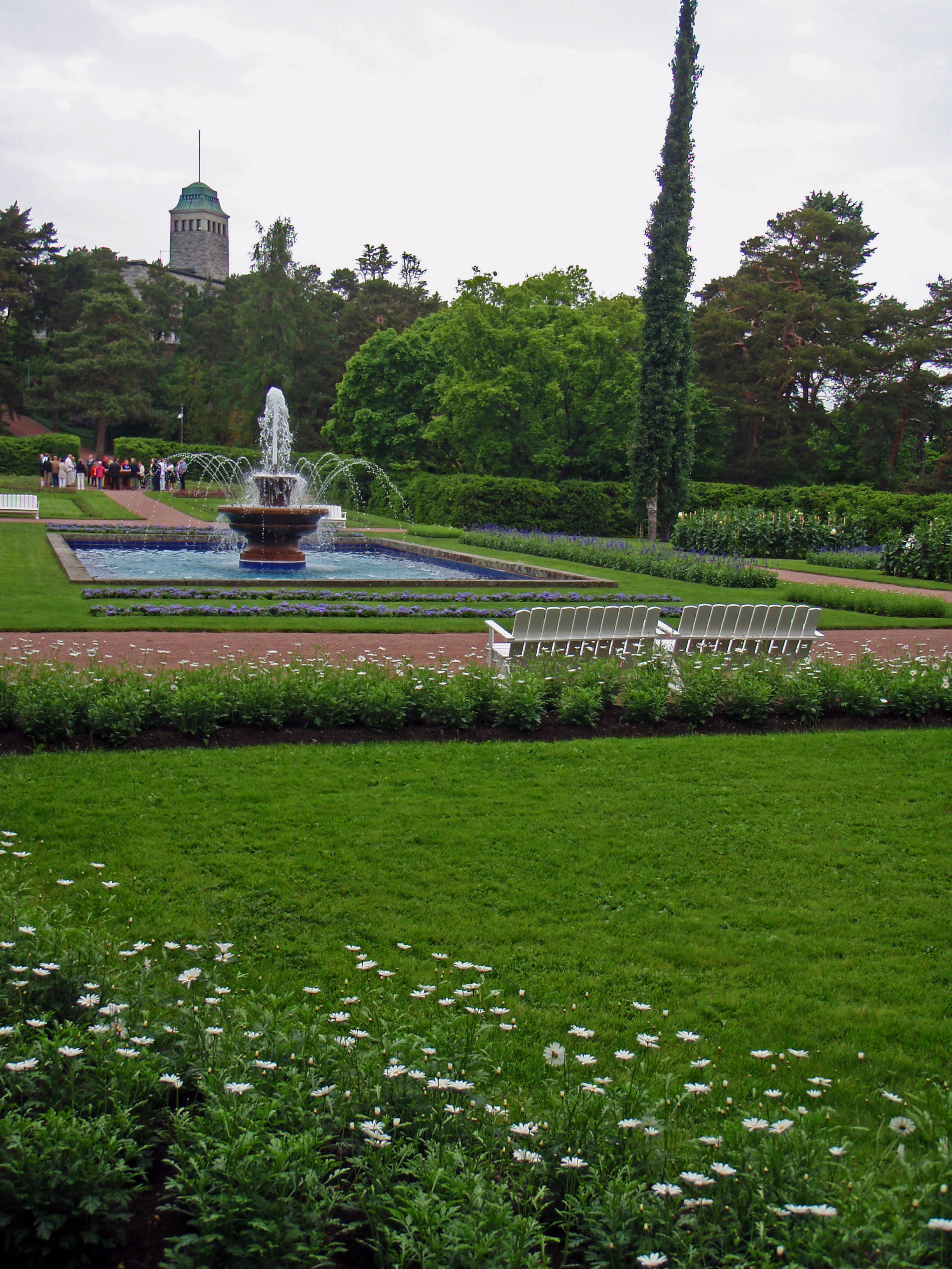 Kultarannan puutarhaa.